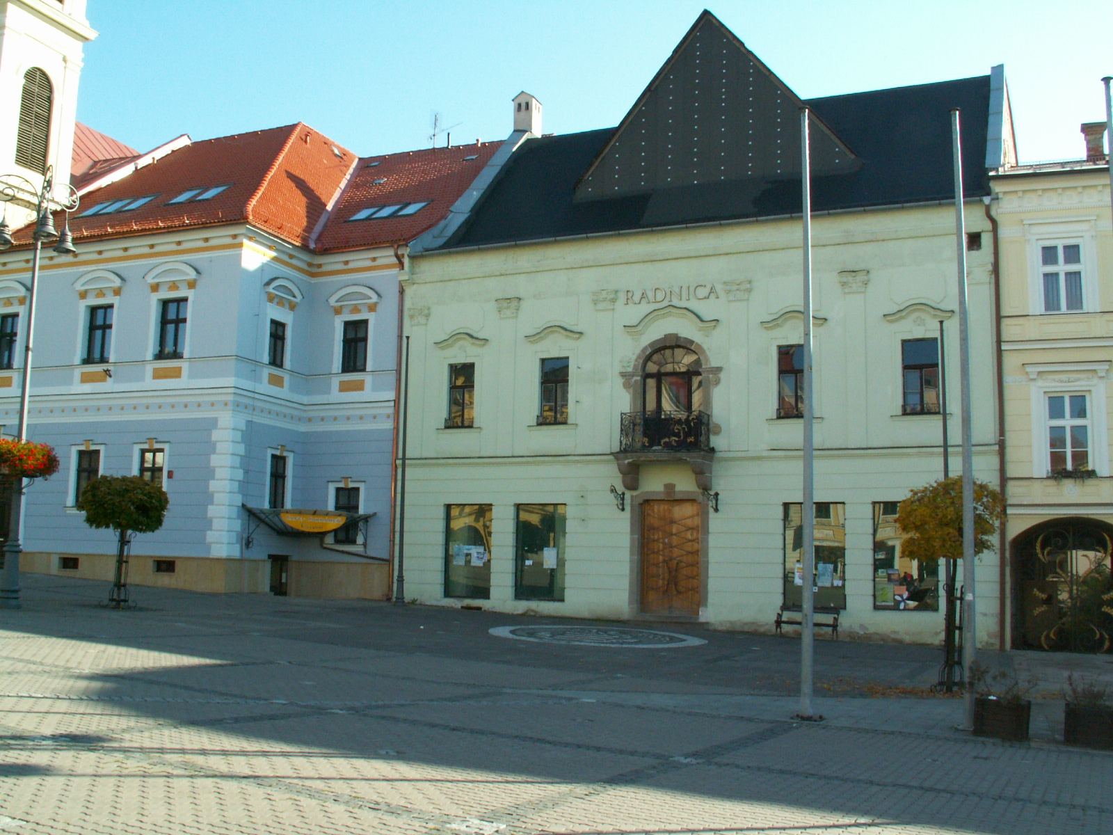 Námestie SNP - nová radnica (vo výstavbe)